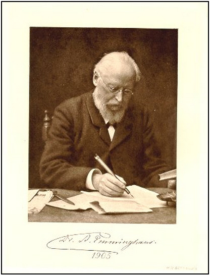 Arwed Emminghaus im Jahre 1905